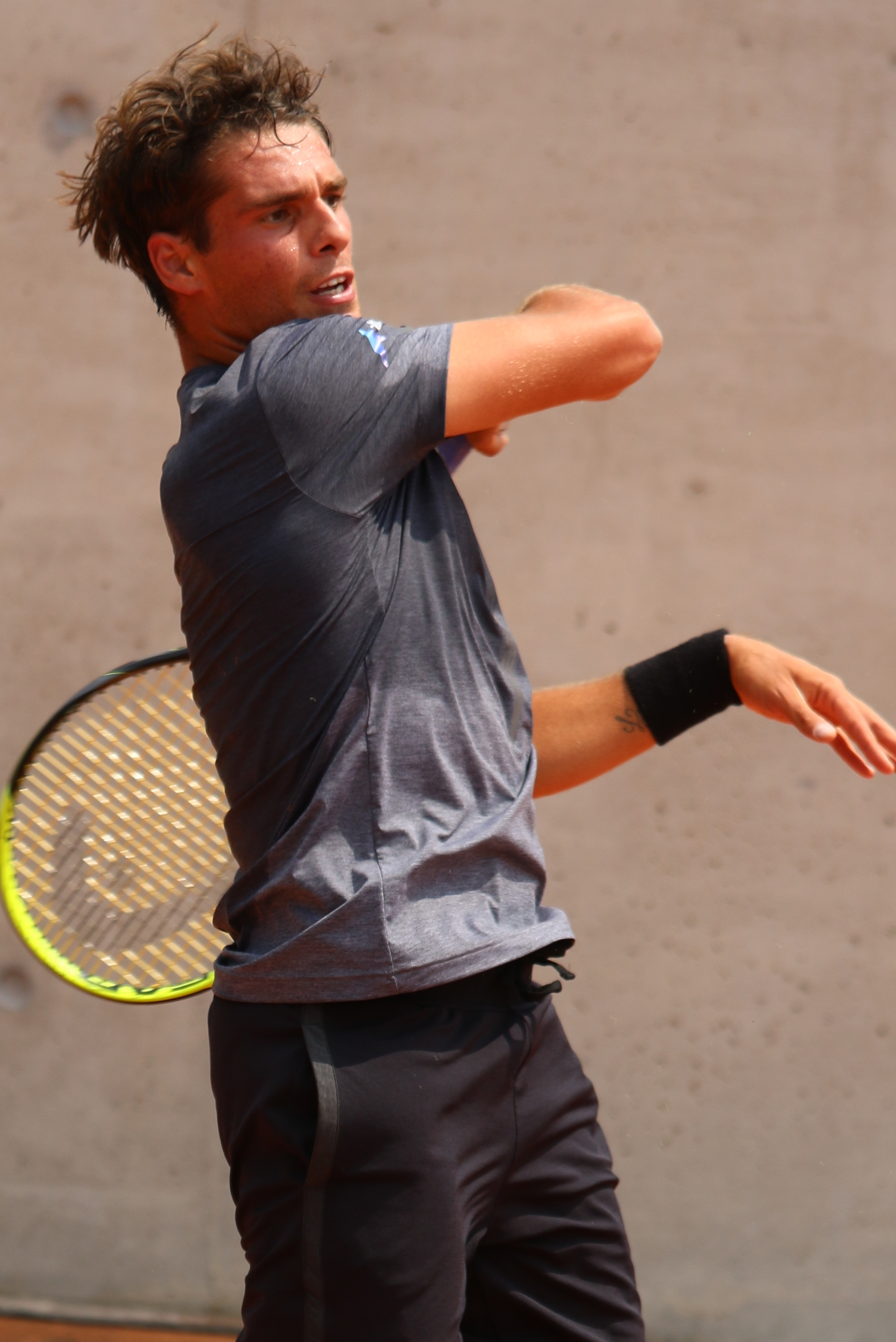 Baldi RGQ19 (4)